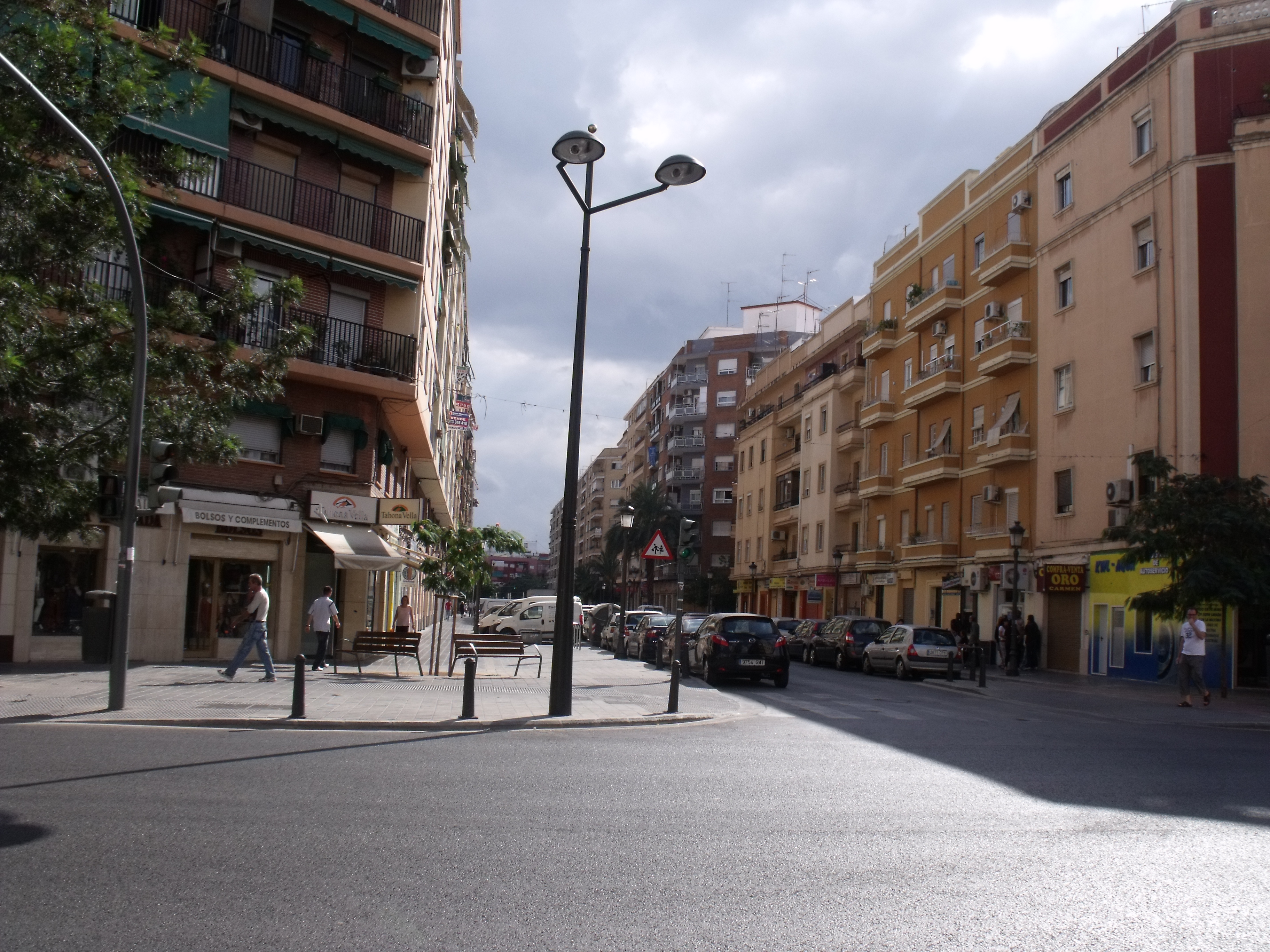 Calle de Llanera de Ranes, en Valencia.